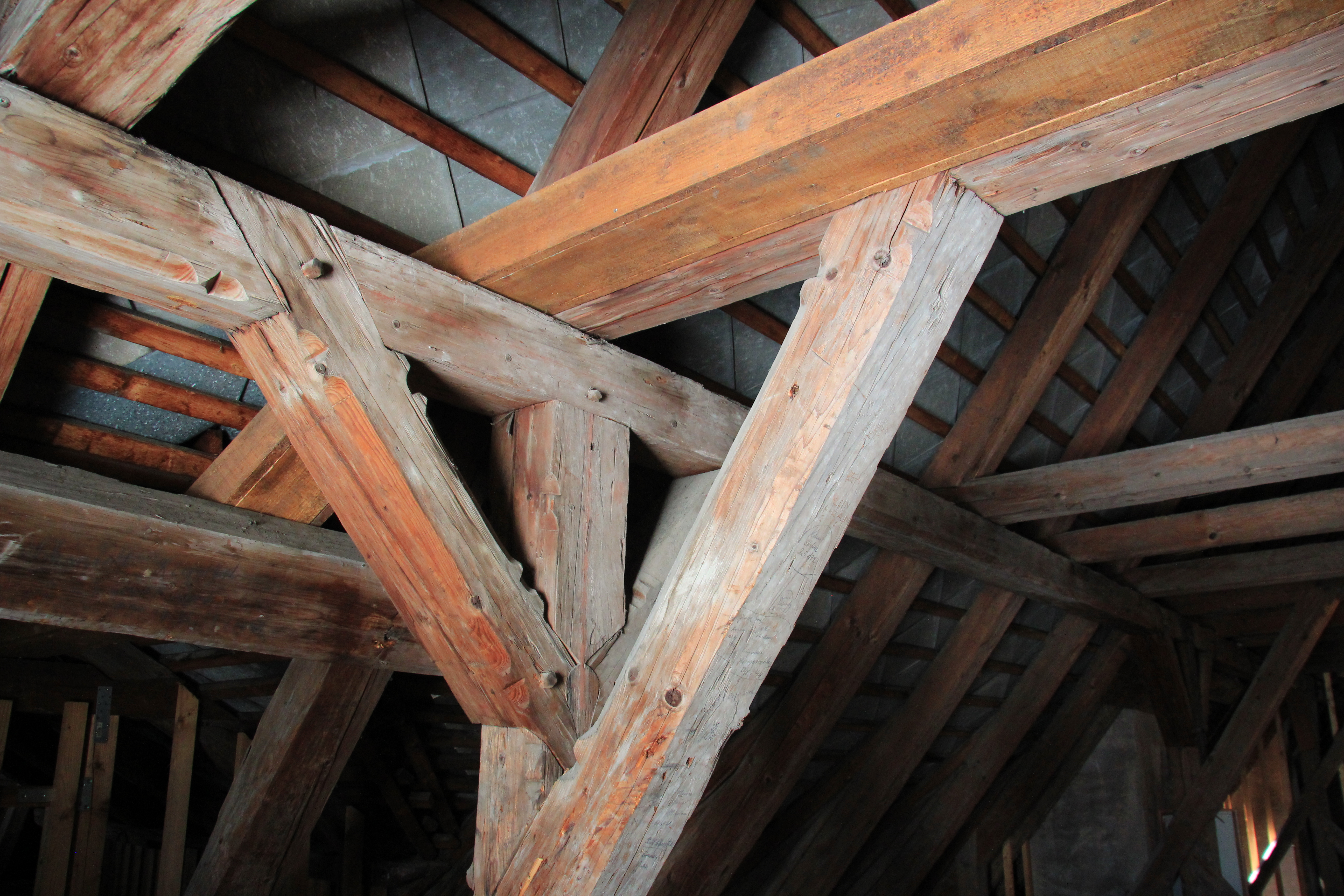 Schloss Weitra in Weitra, Waldviertel, Niederösterreich